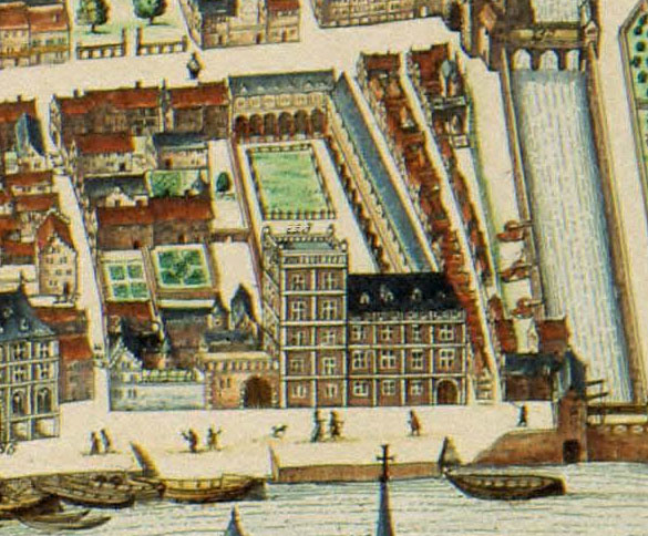 Carte de Blaeu, extrait montrant le palais Curtius